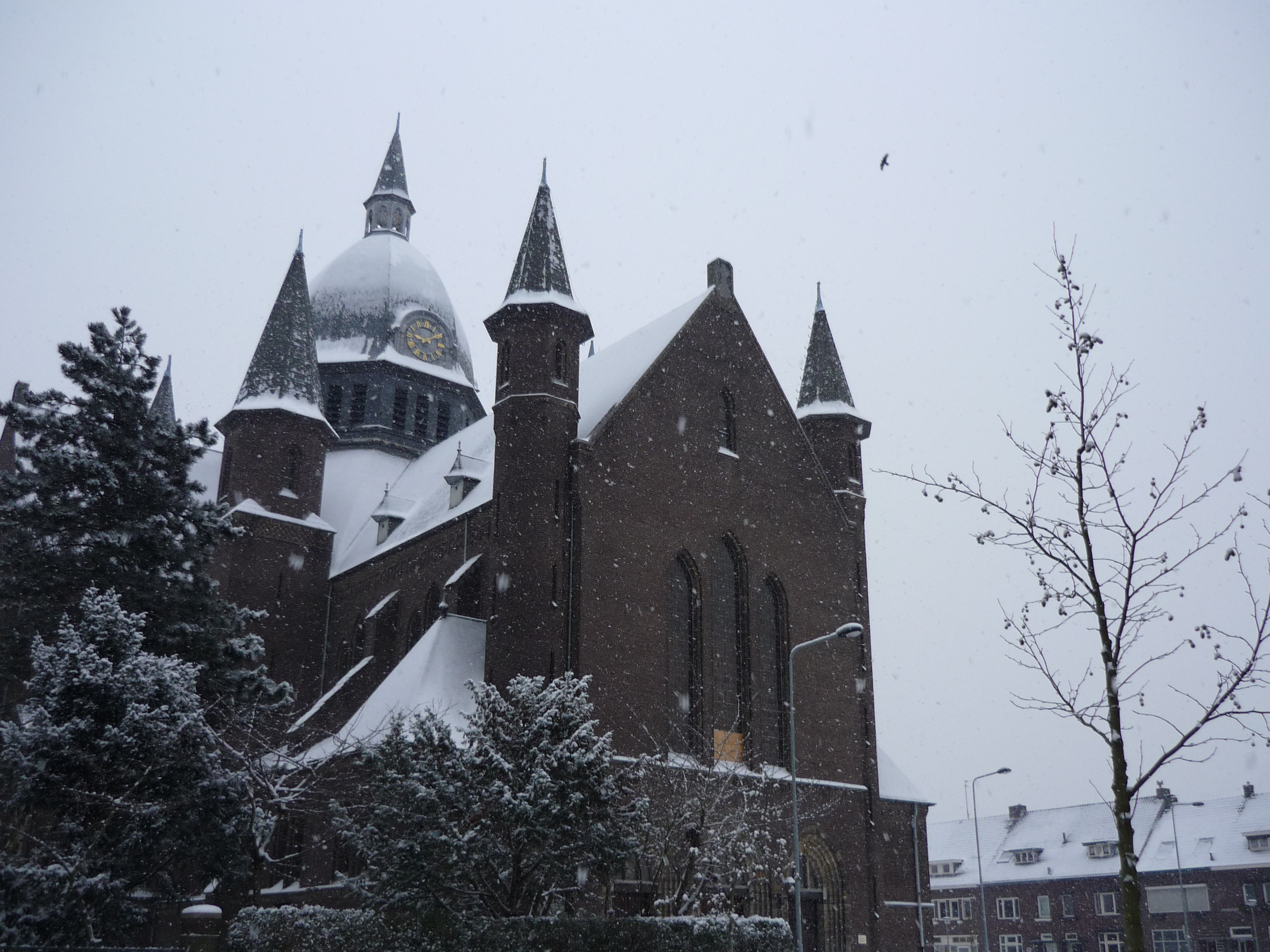 Rijksmonumentenregister 520535